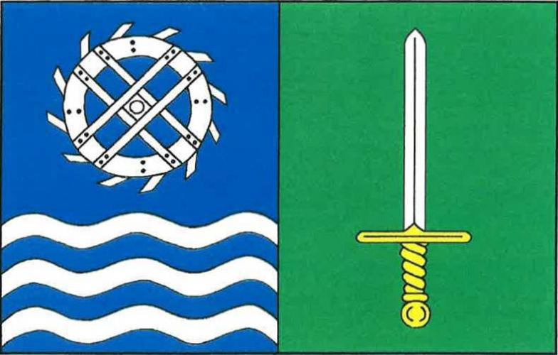 vlajka, Těchonín, okres Ústí nad Orlicí